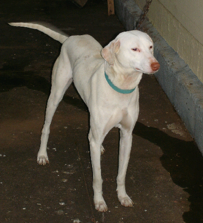 Rajapalayam Hound